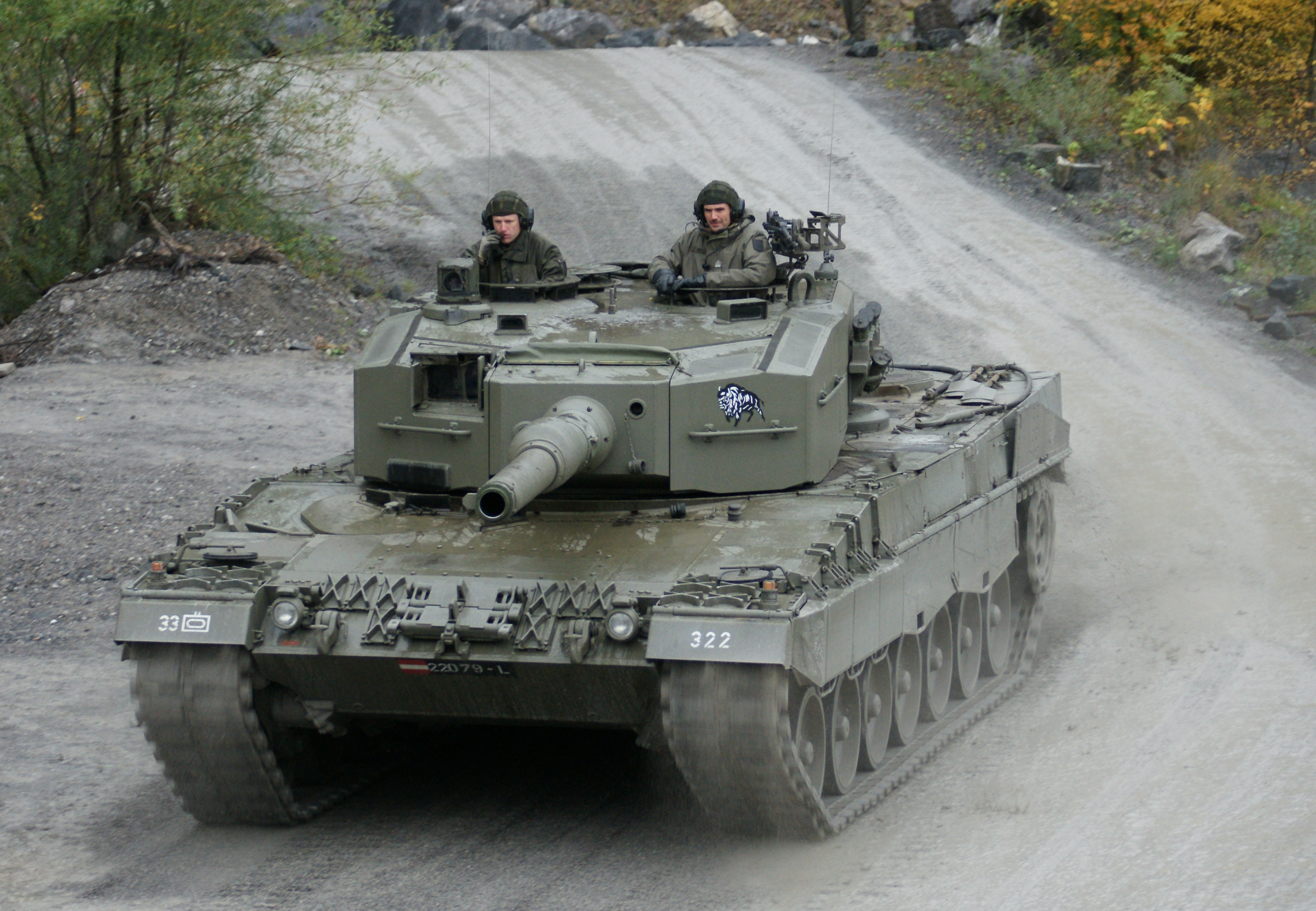 Im Zuge einer Road-Show zeigte das Österreichische Bundesheer im Dornbirner / Hohenemser Steinbruch den Kampfpanzer Leopard 2A4. Er ist das Hauptwaffensystem der österreichischen Panzertruppe. Als Hauptwaffe verfügt der Panzer über eine 120 Millimeter Kanone. Die starke Motorisierung sorgt trotz der starken Panzerung für die enorme Beweglichkeit des Fahrzeuges.